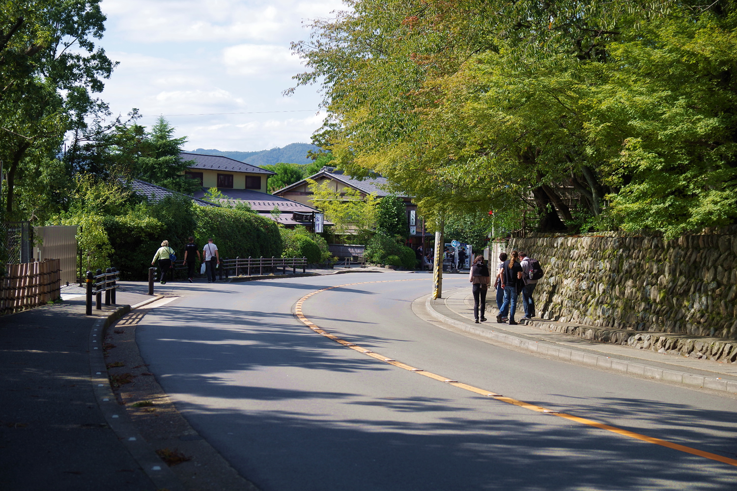 京都市北西部の観光道路「きぬかけの路」 龍安寺近くで撮影